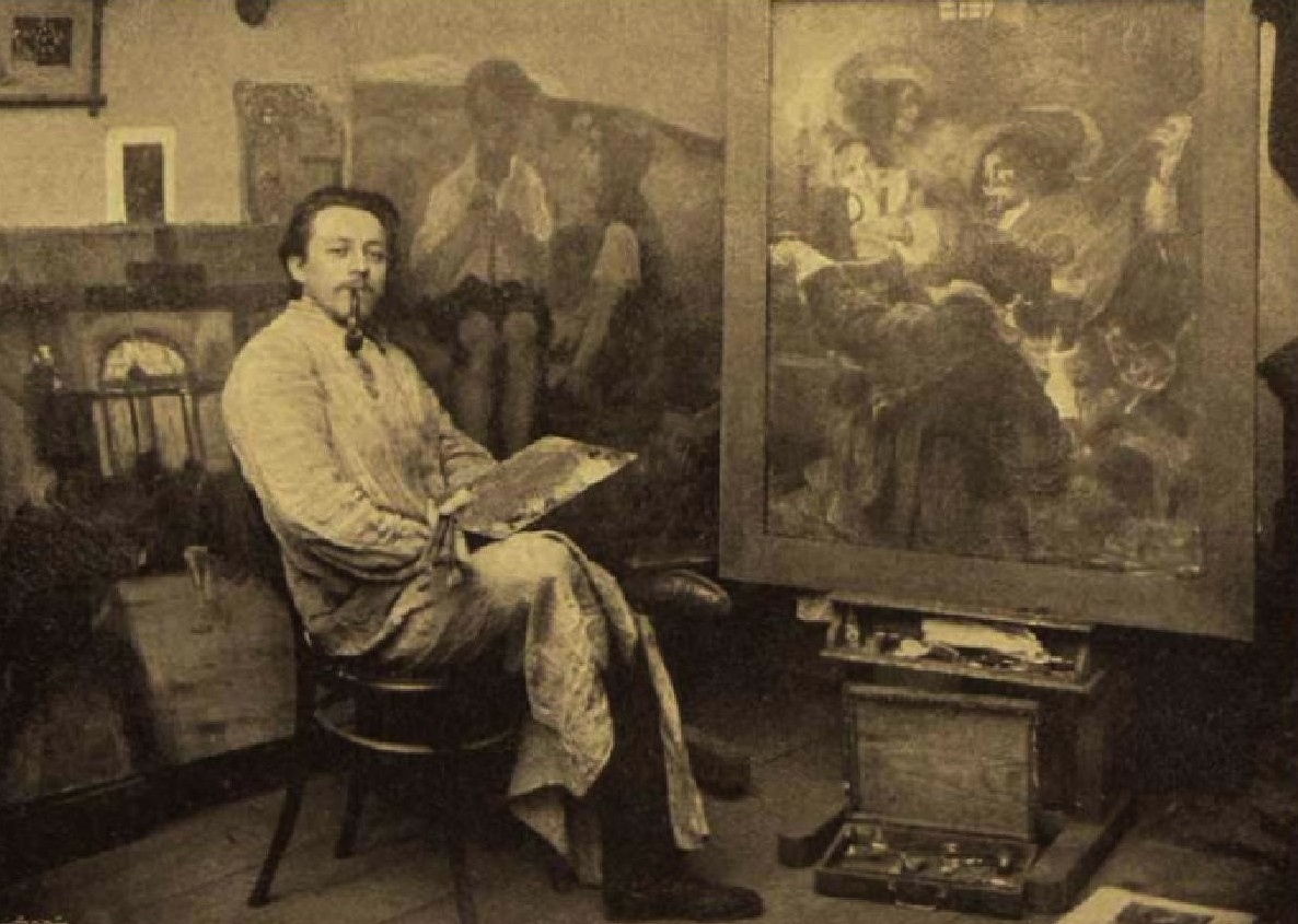 Akademický malíř Alois Wierer